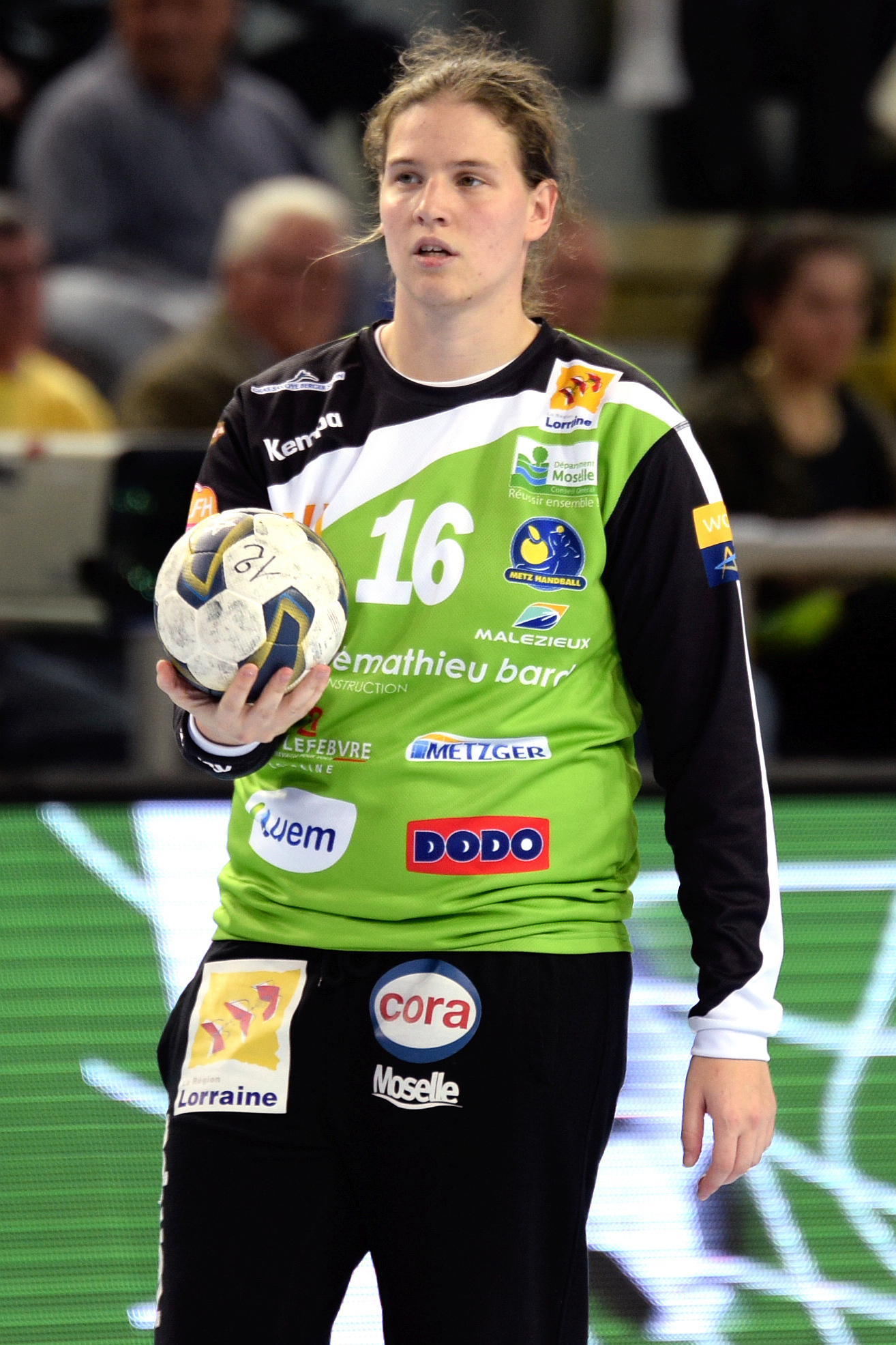 Déborah Dangueuger , le 15 novembre 2014 lors du match de Ligue des champions Metz / Larvik.